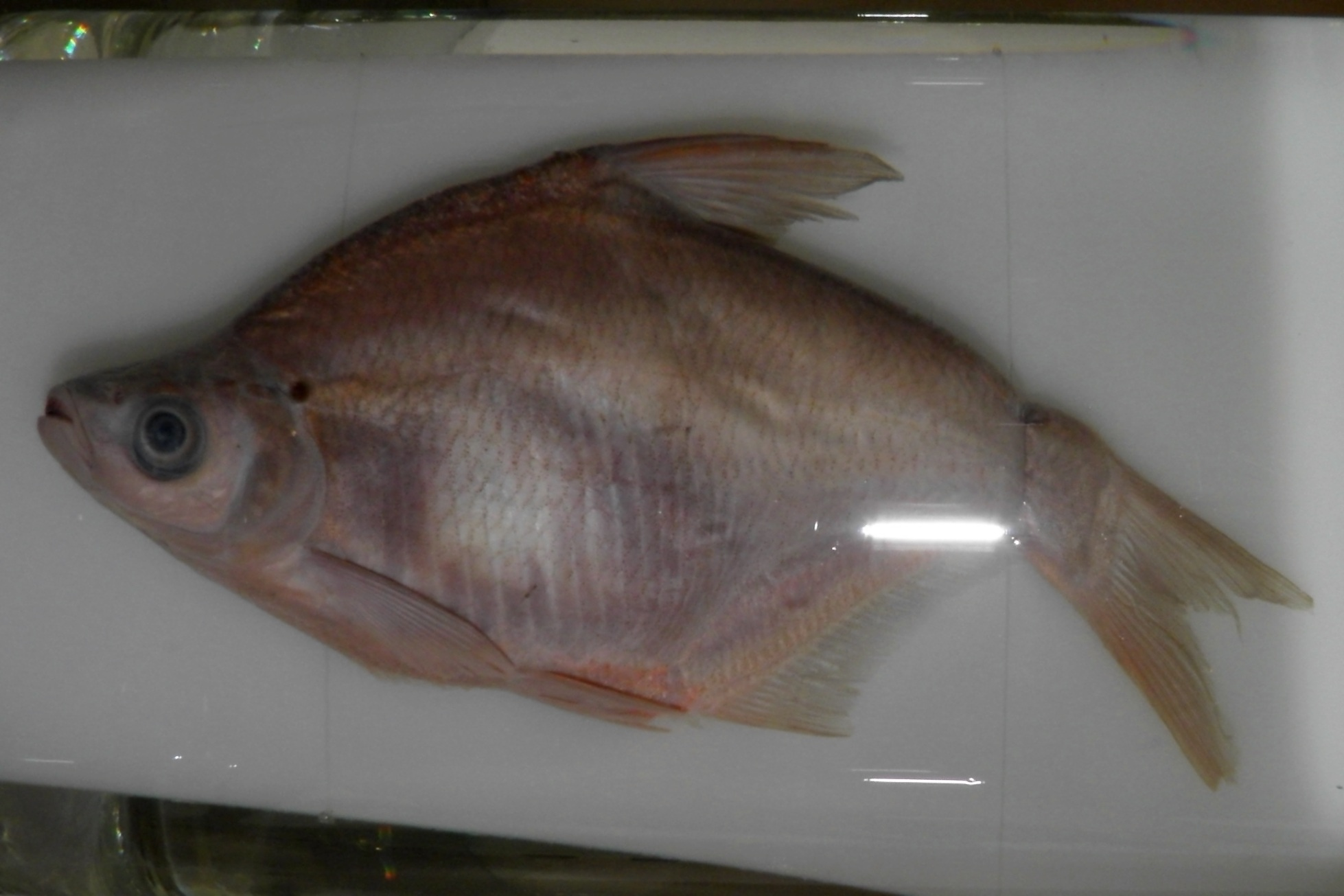 (Амурский) чёрный лещ (Megalobrama terminalis)